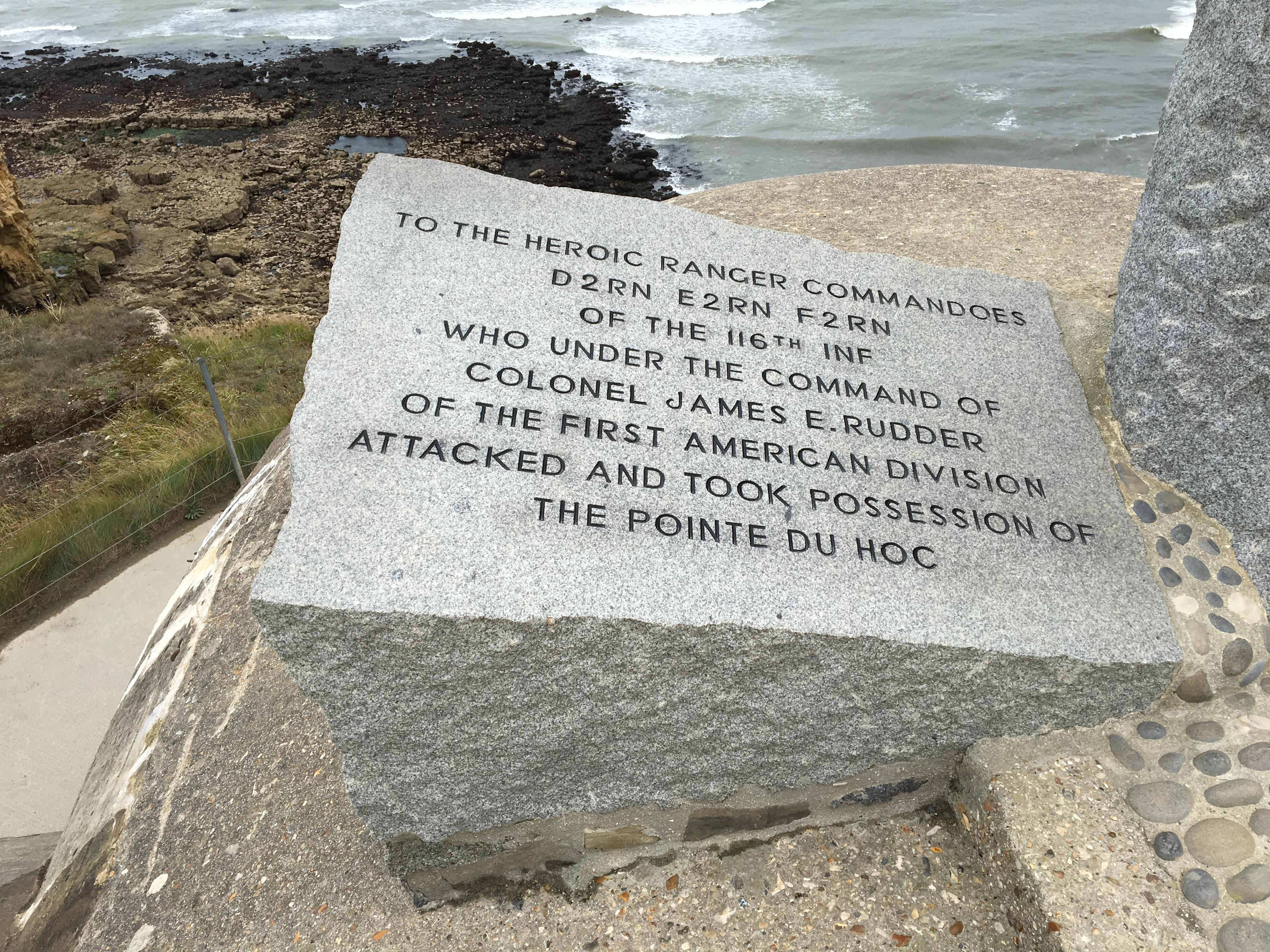 Bild från monumentet på Pointe du Hoc.